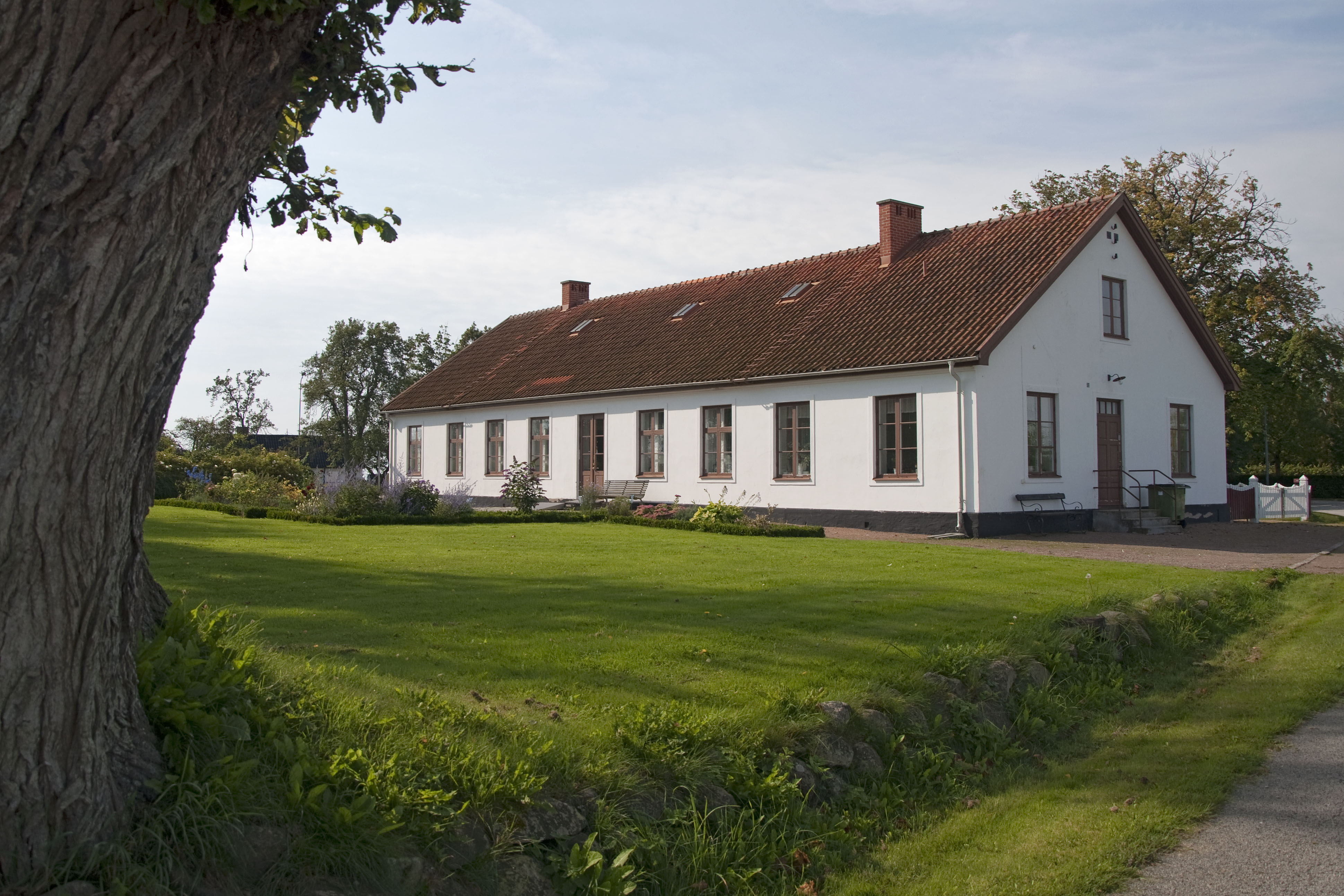 Västra Sallerups prästgård i Eslövs kommun.